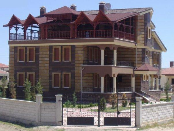 Tavşançalının Meşhur Evlerinden Bir Görüntü